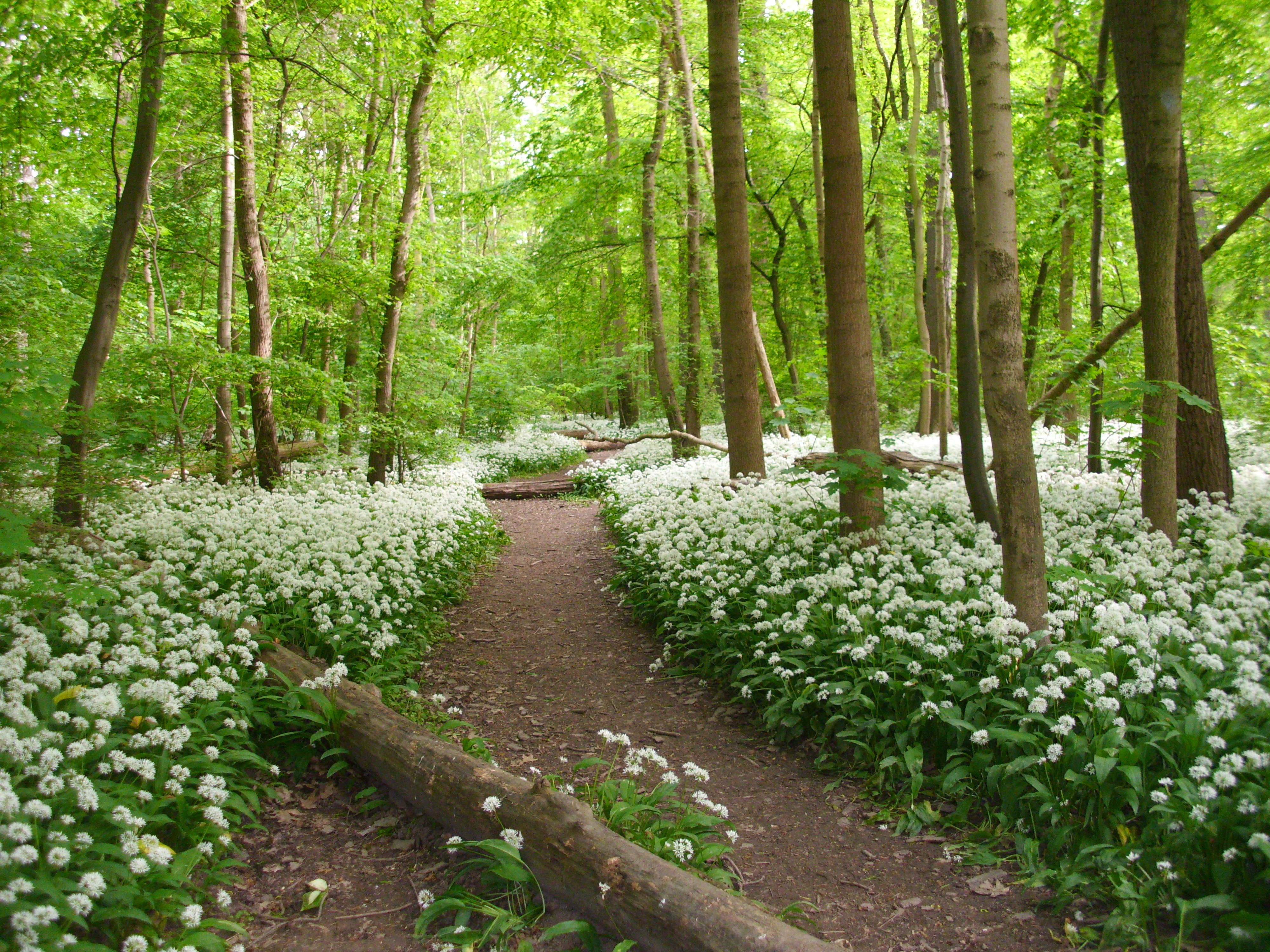 Wilder Knoblauch